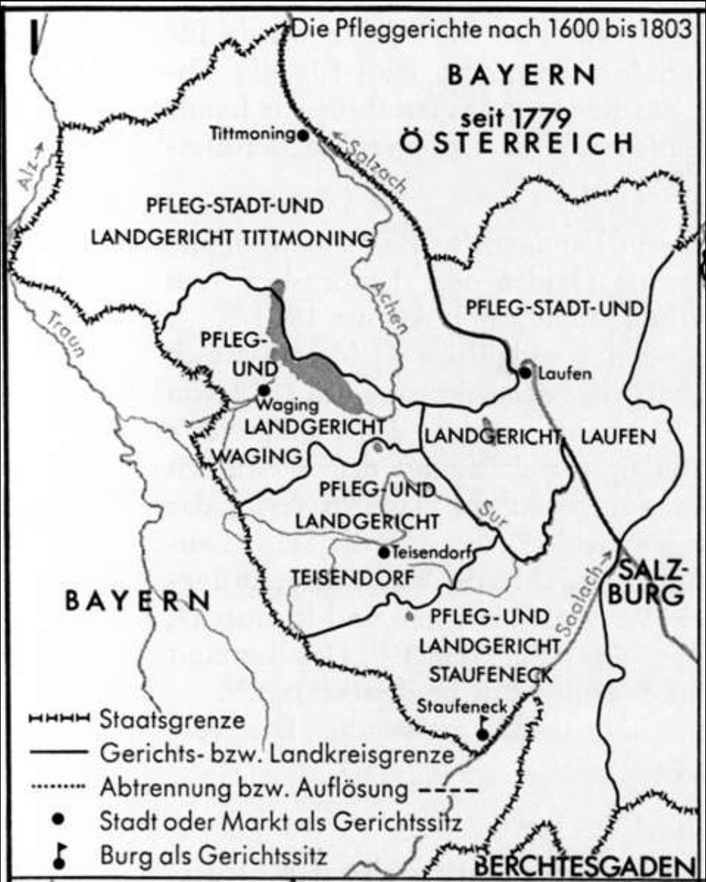 Karte des Rupertiwinkels mit den Pfleg- und Landgerichte des Fürstbistums Salzburg.